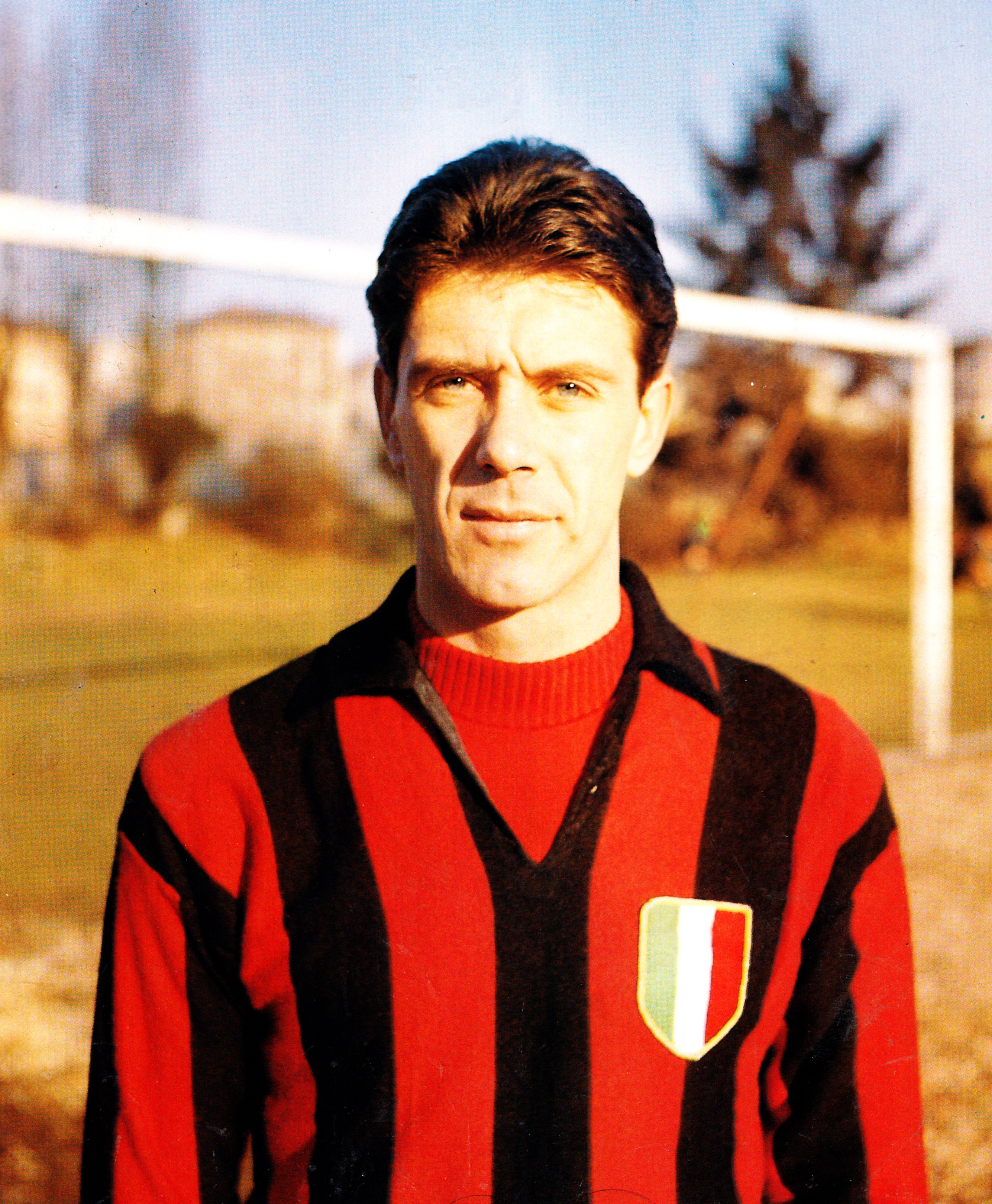 Il calciatore italiano Cesare Maldini al Milan tra gli anni 1950 e 1960. Licensing Maldini, Cesare, 1954 1954